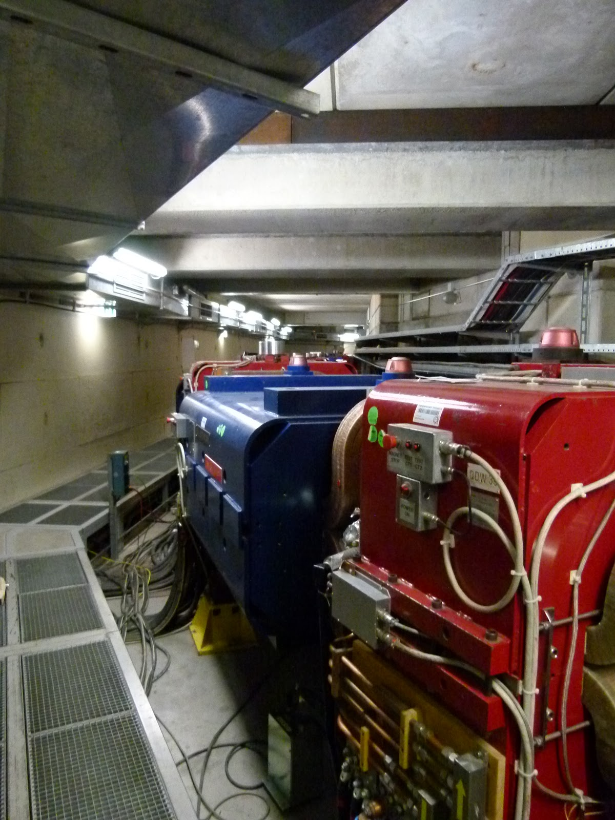 AD - Anti matter Deaccelerator מאיץ החלקיקים